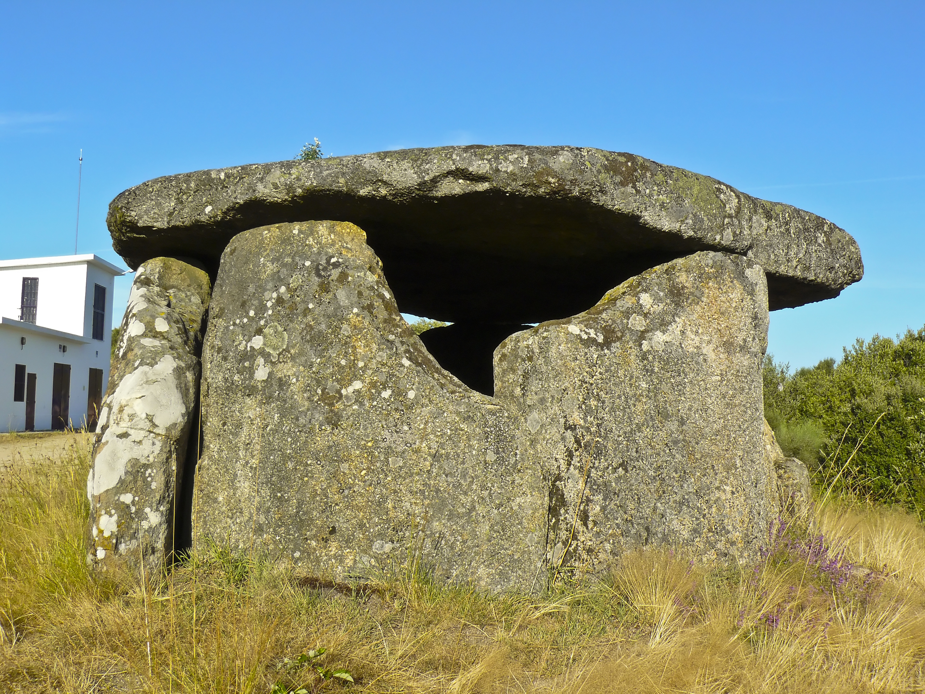 Casiña da Moura - Encoro das Maus de Salas - Muíños - Ourense